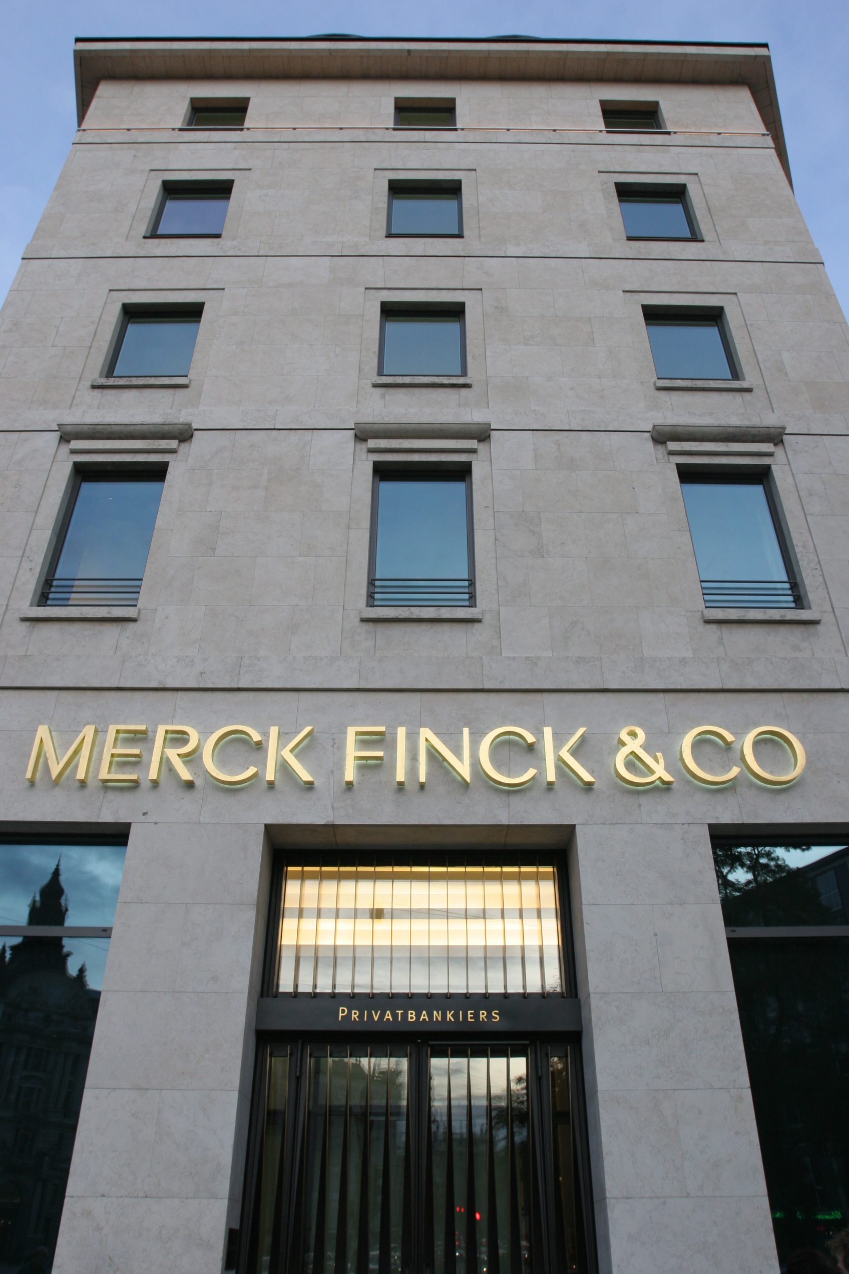 Stammhaus des Bankhauses Merck Fink & Co am Maximiliansplatz in München, 1957-1958, einziges Nachkriegswerk des NS-Architekten Ernst Sagebiel